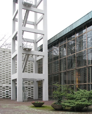 Paul-Gerhardt-Kirche in Mannheim-Neckarstadt-West